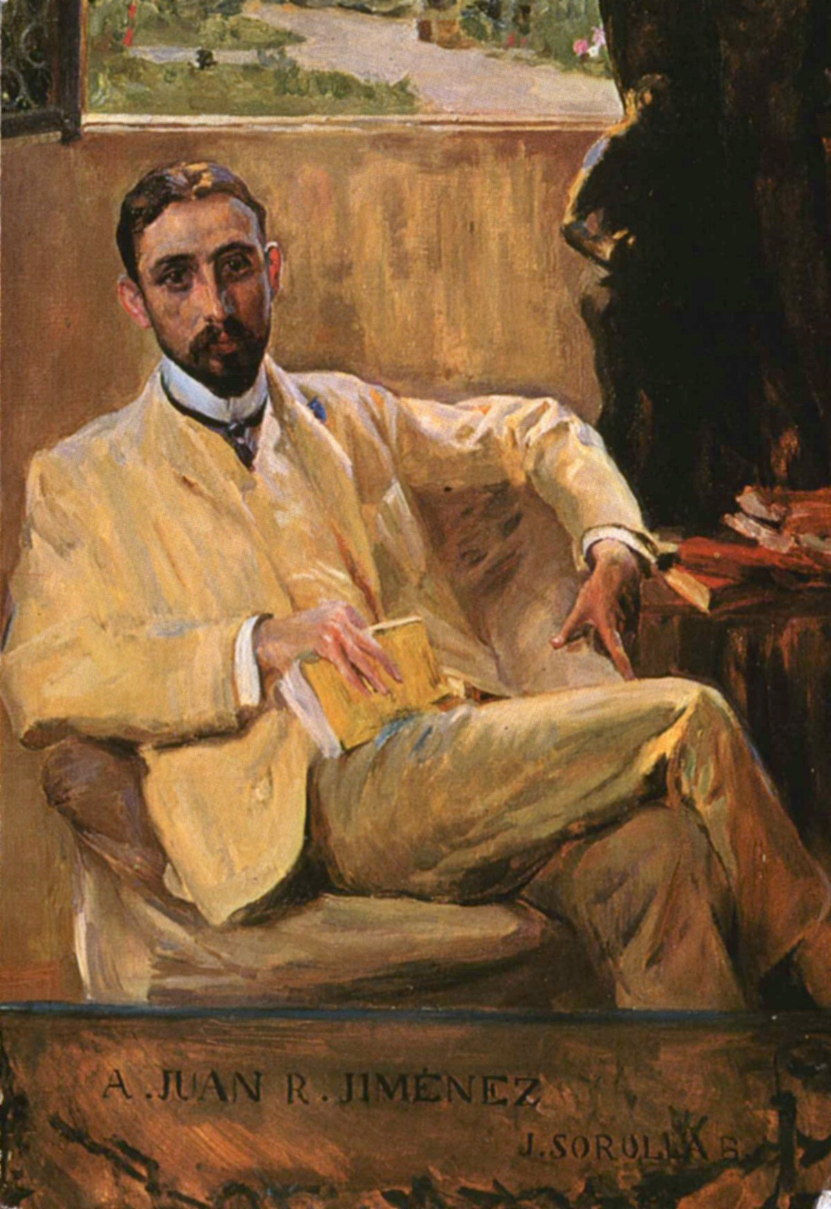 Retrato de Juan Ramón Jiménez, poeta español, realizado por Joaquín Sorolla.